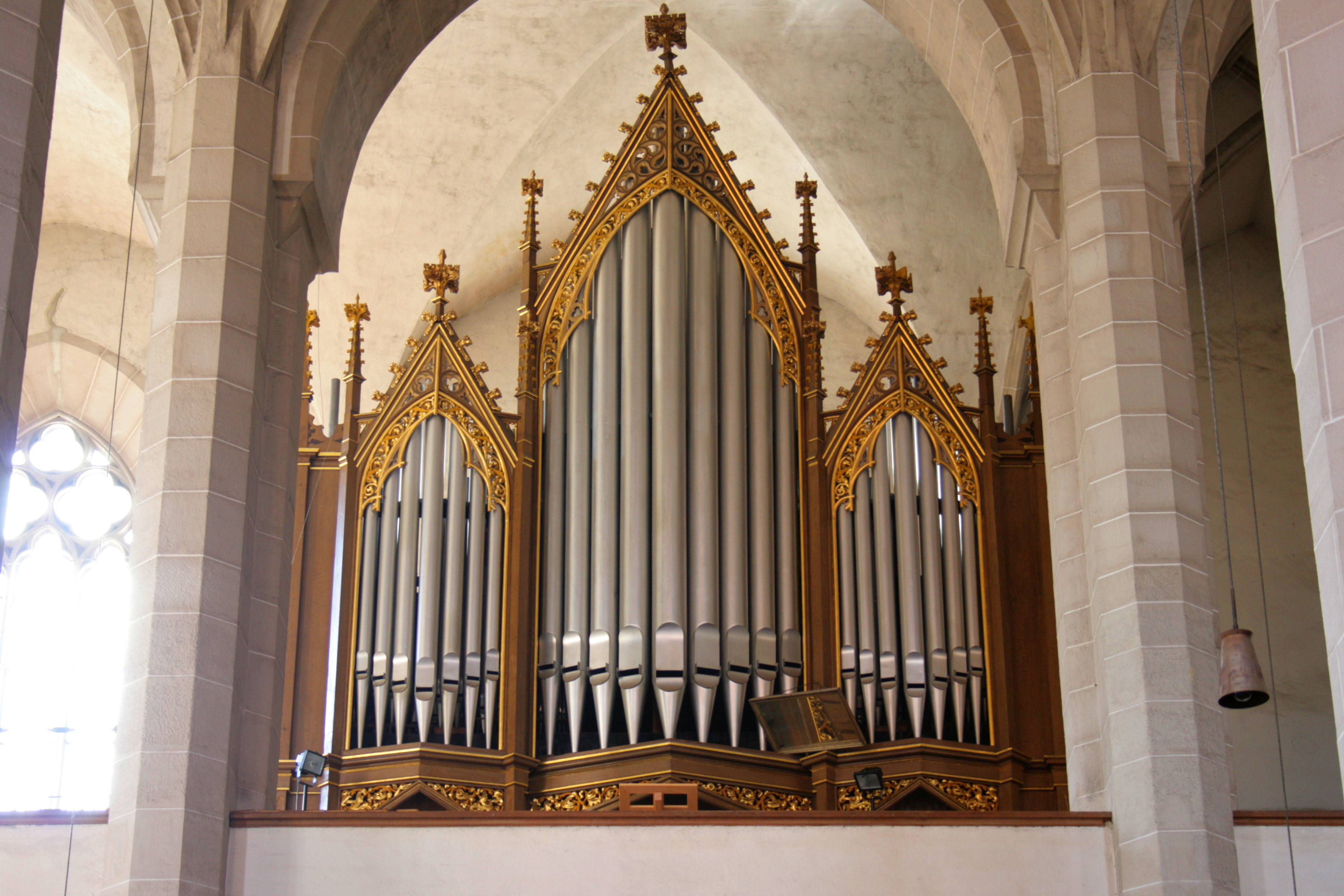 Dom St. Petri in Bautzen, katholischer Teil Hornjoserbsce: Tachantska cyrkej swj. Pětra w Budyšinje; katolski dźěl.